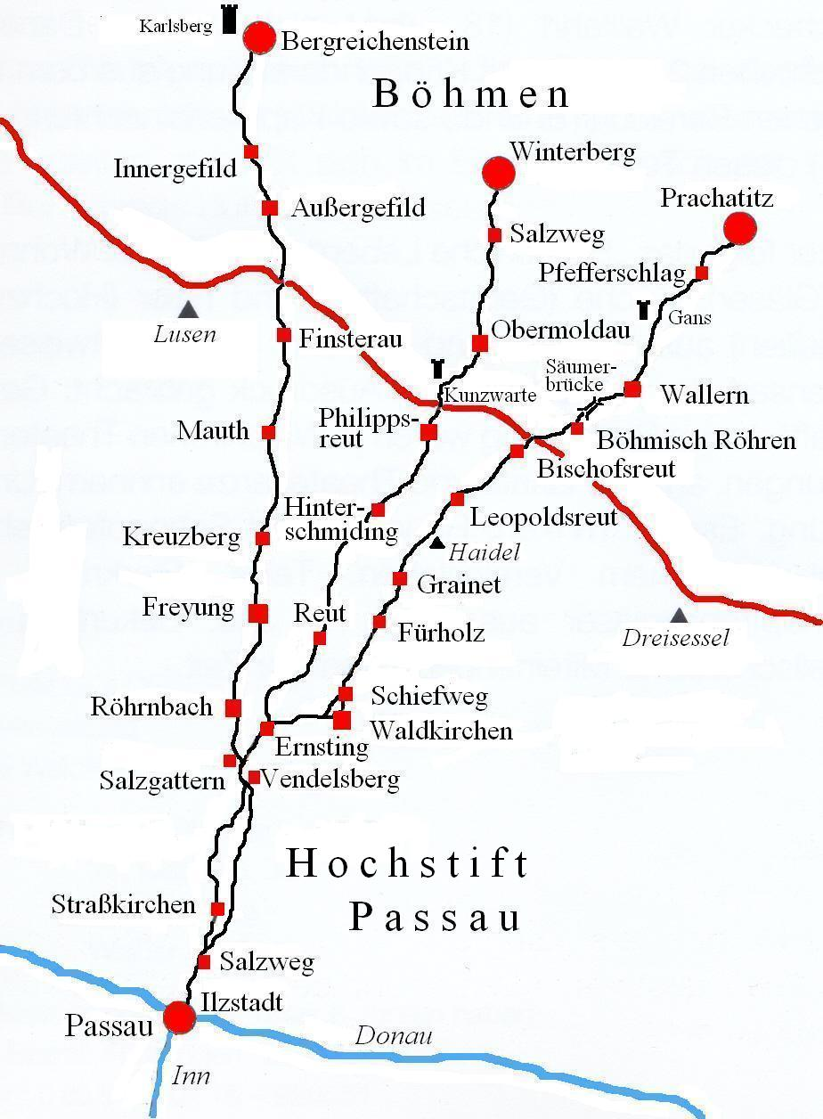 „Der Goldene Steig“, die Bezeichnung für einen oder mehrere Handelswege von Passau nach Böhmen. Zeit: 2. Hälfte des 14. Jahrhunderts bis Anfang des 17. Jhdts. Die Karte zeigt die Situation nach der Entstehung des Weges nach Bergreichenstein um 1356 bis ca. 1600 als der Verkehr nach Winterberg immer mehr über Freyung verlief. Prachatitzer Weg seit 1010 nachgewiesen Winterberger Weg seit ca. 1300 Bergreichensteiner Weg ab ca. 1356 Bitte beachten... Zur besseren Orientierung sind auch Orte, die erst nach dem 14. Jahrhundert entstanden sind, eingezeichnet.